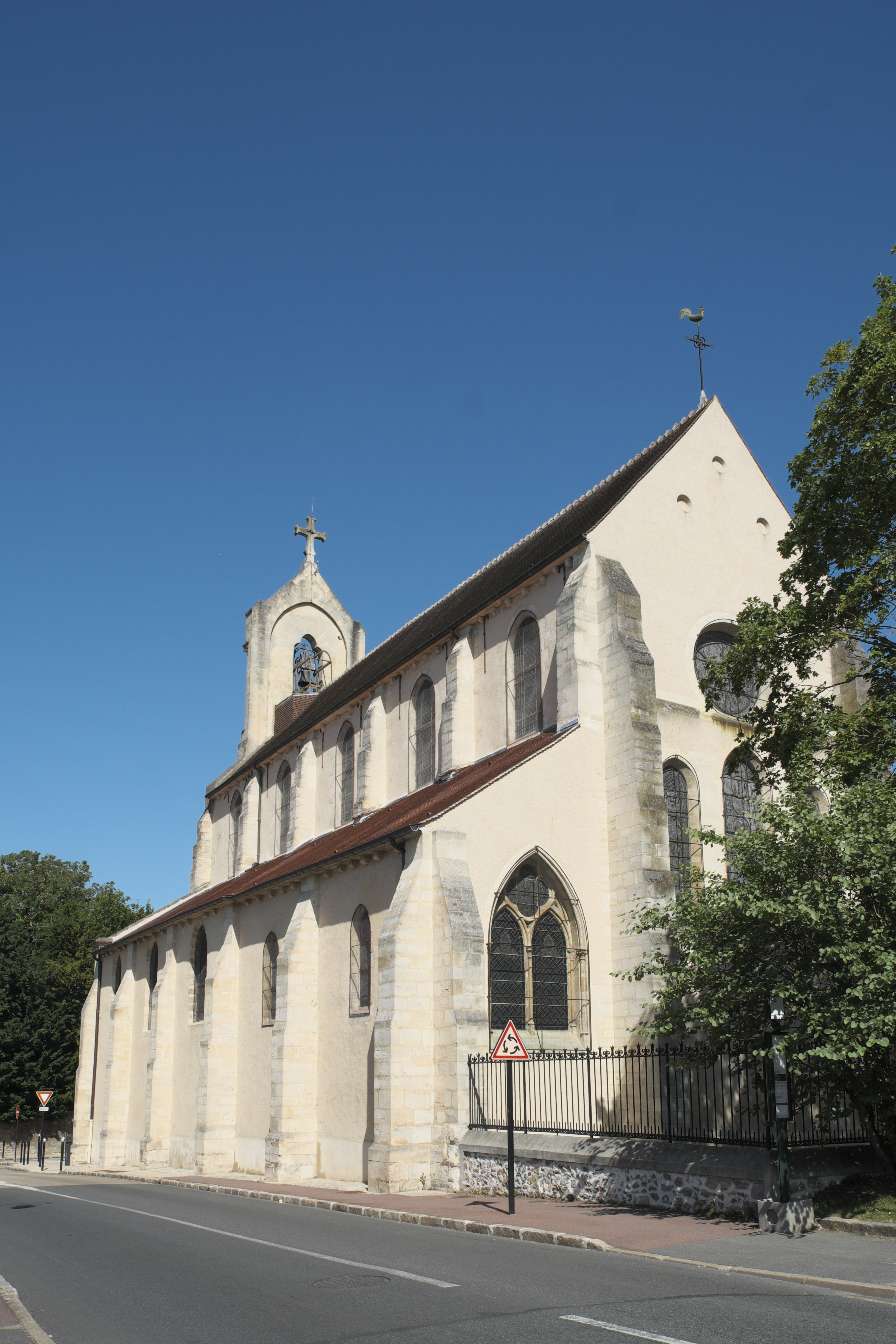 Katholische Pfarrkirche Saint-Vincent-Saint-Germain in Saint-Germain-lès-Corbeil im Département Essonne (Region Île-de-France/Frankreich), Südseite